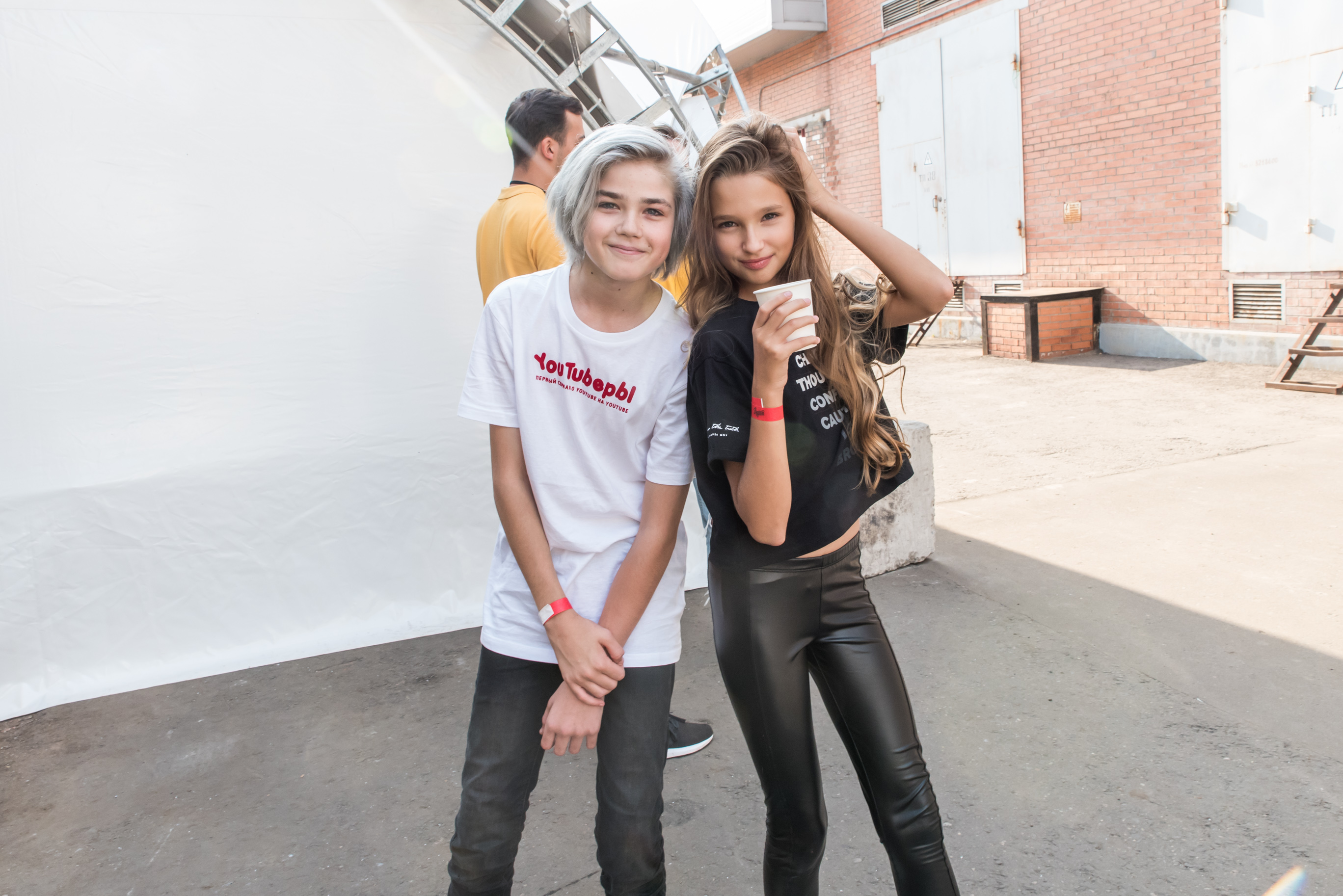 Mimimizhka и Лиза Анохина на Видфест 2018 в Москве